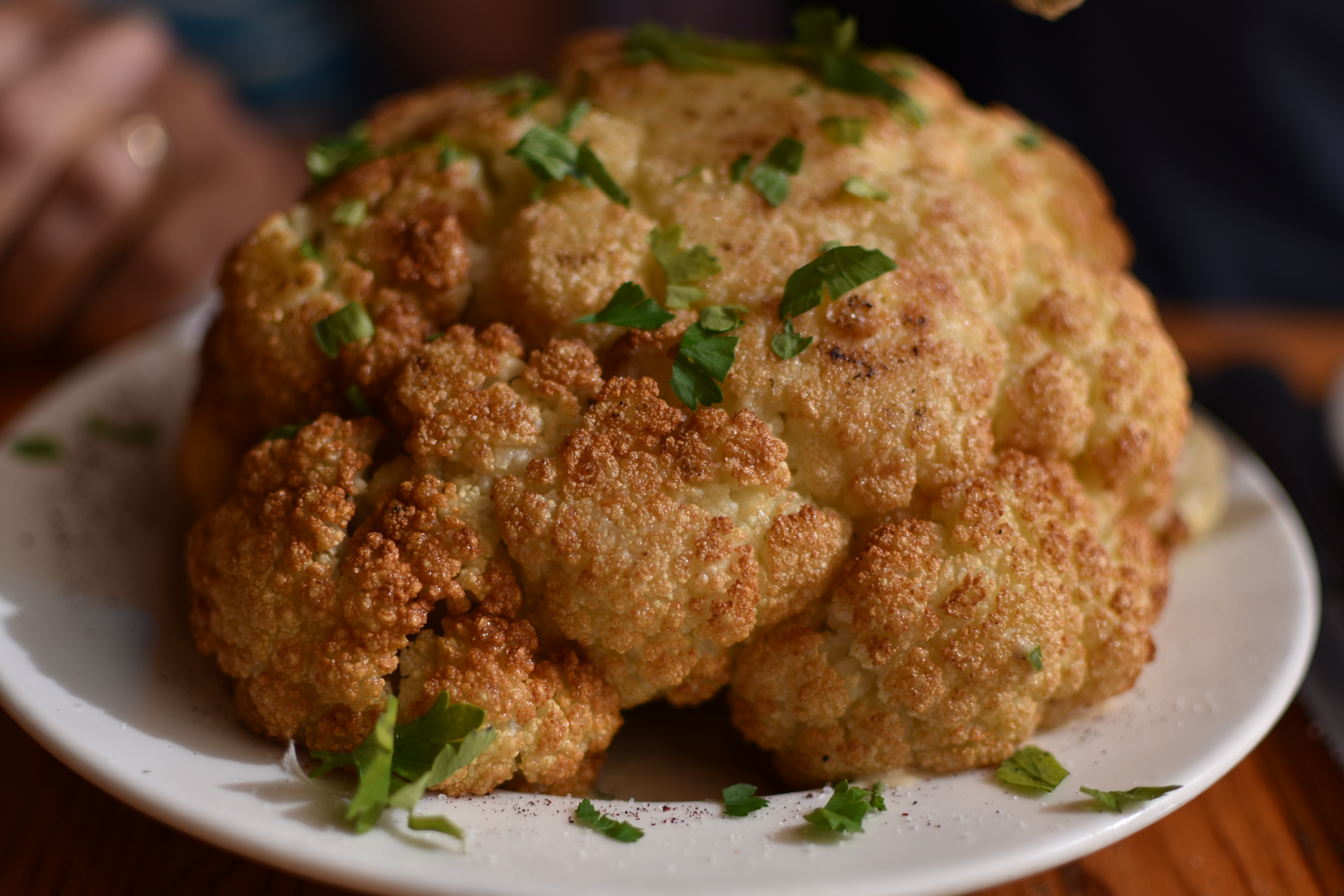 כרובית אפויה בצלחת